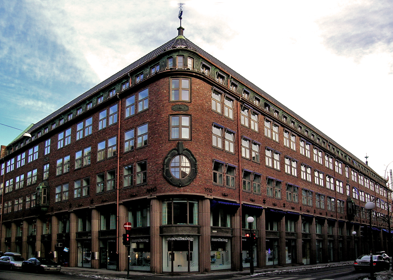 Sjøfartsbygningen, Kirkegata 7/Kongens gate 6, Oslo. Built 1915. Architect: Ingvar Hjorth